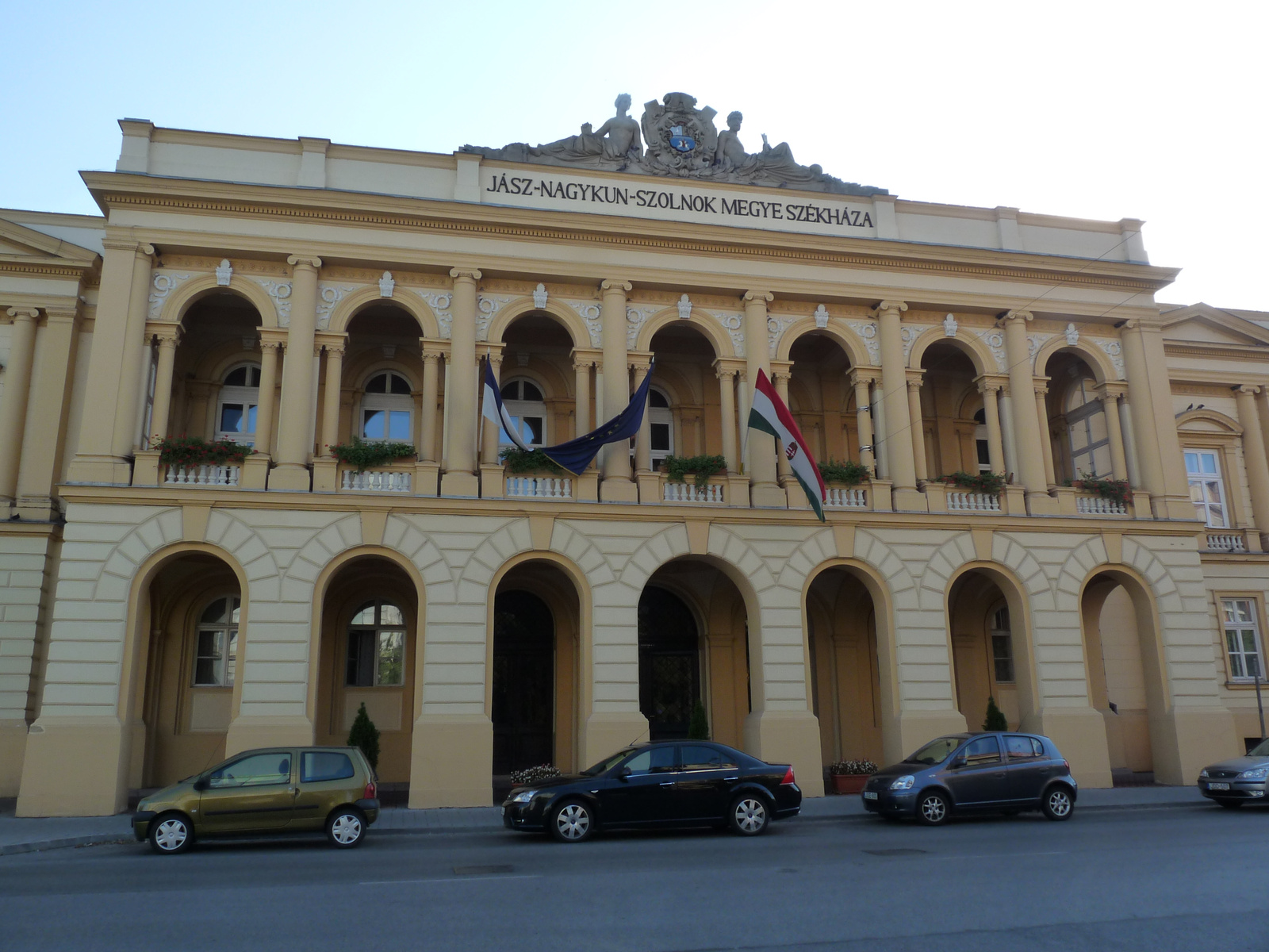 Megyeháza (Szolnok, Kossuth u. 2 .) This is a photo of a monument in Hungary. Identifier: 6046